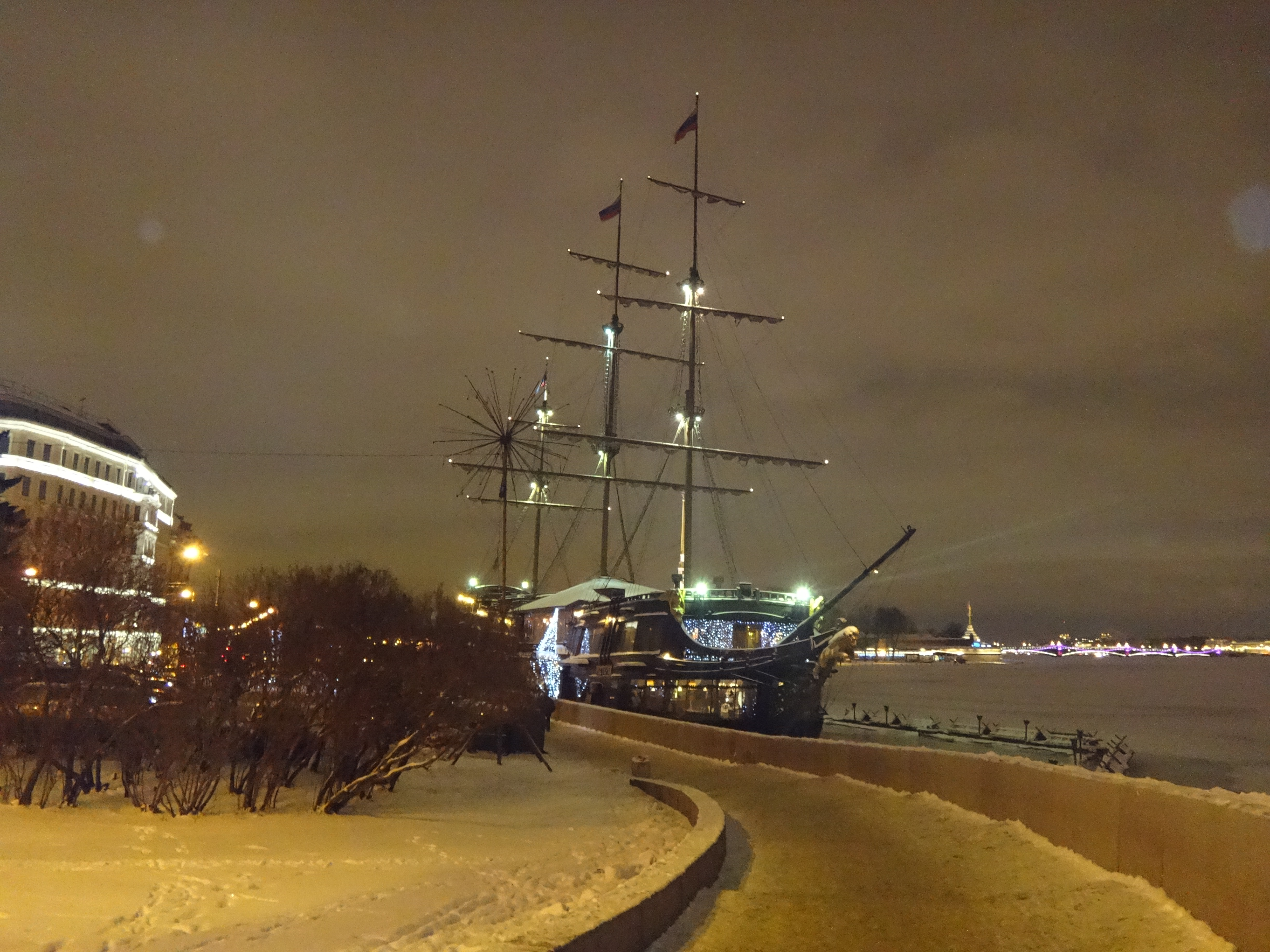 Корабельная кафешка